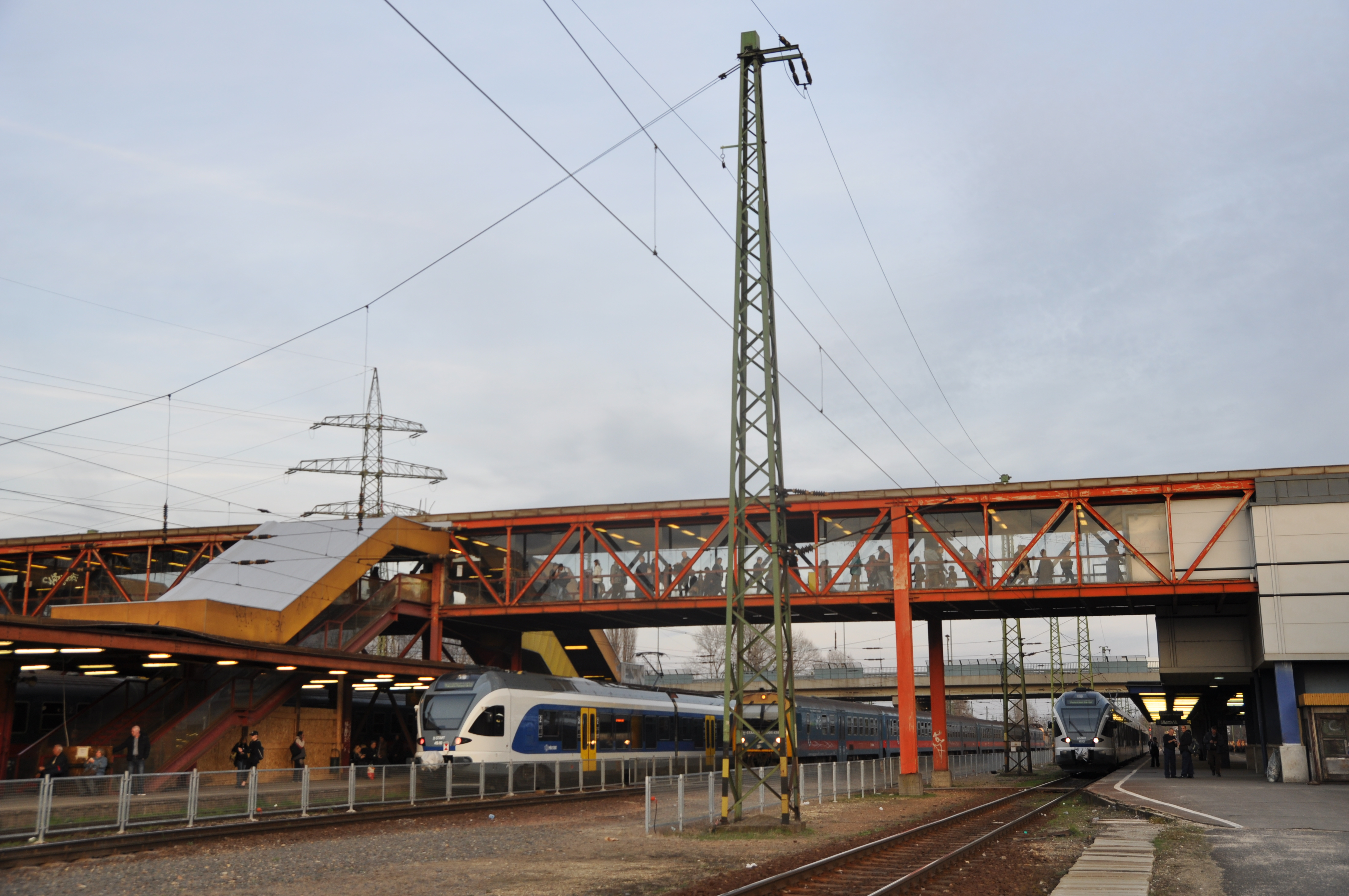 Budapest, Kőbánya-Kispest vasútállomás